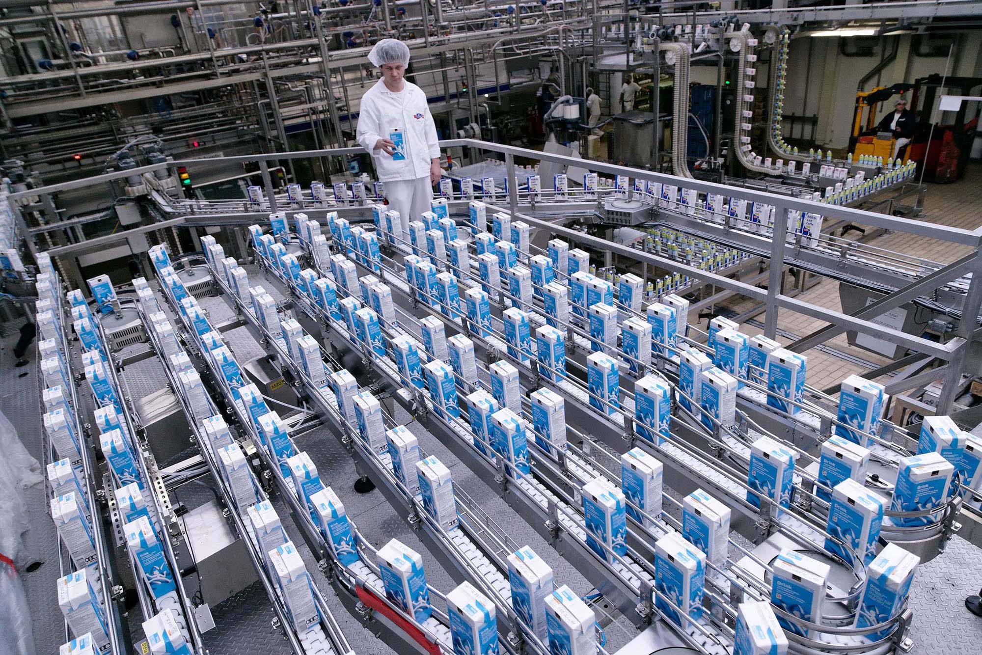 Produktionseinrichtungen, hier für die industrielle Milchverarbeitung in der Emmi Mittelland Molkerei AG in Suhr AG, Schweiz.